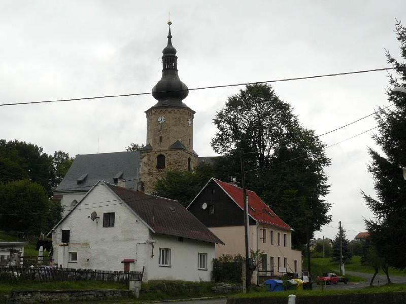 Část obce Jindřichovice